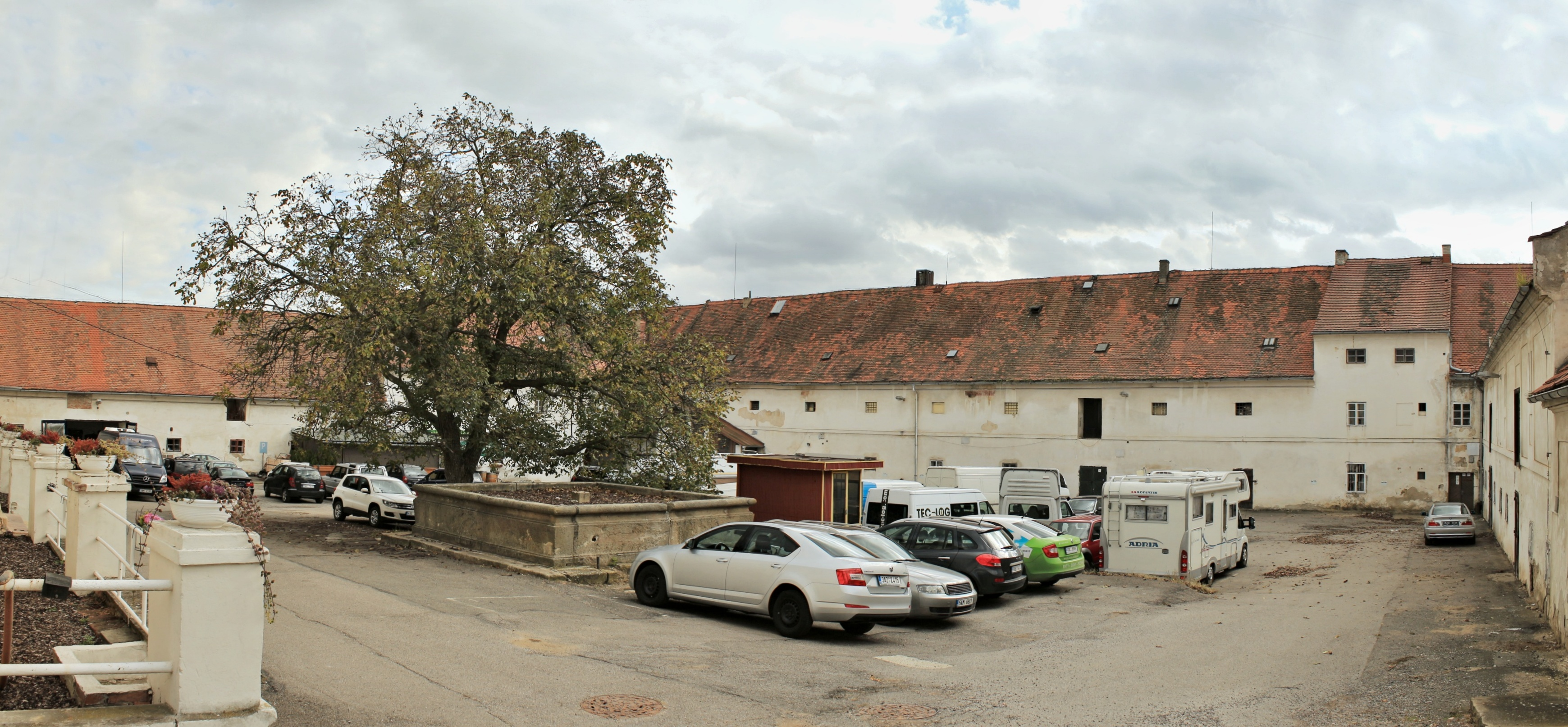 Jinonický zámeček